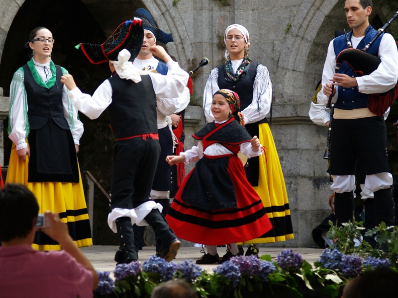 Festa galega no Mosteiro de Monfero